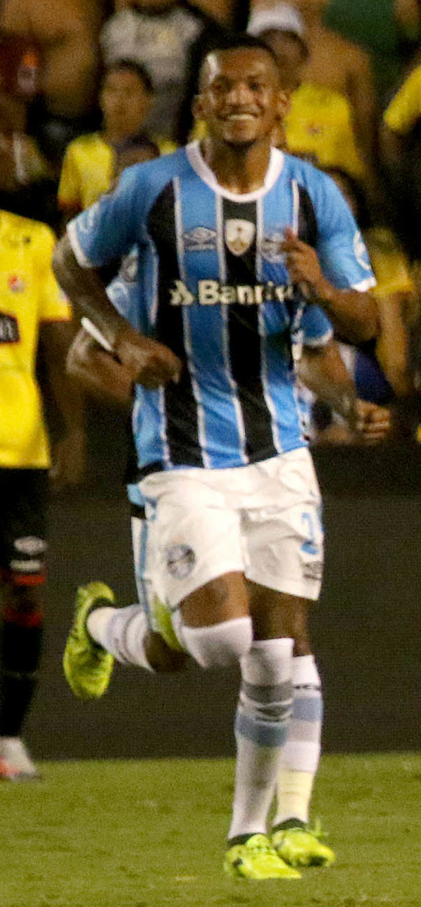 Guayaquil 25 de octubre del 2017 (Andes).- En el estadio Monumental, Barcelona se enfrenta a Gremio de Porto Alegre en el partido de ida por la semifinal de la Copa Libertadores 2017 Foto:Andes/César Muñoz